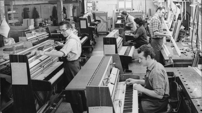 Sangerhausen, Herstellung von Pianos Zentralbild/Schaar/10.2.71/Halle: Messeschlager aus Sangerhausen, Auf der diesjährigen Leipziger Frühjahrsmesse wird das Exportunternehmen Alexander Herrmann KG Sangerhausen, das seit 1903 Pianos herstellt, eine Neuentwicklung - das Piano Modell 103 - vorstellen. Es besitzt eine neue Steganordnung und erstmals 37 Töne im Baß. Unser Foto zeigt einen Blick in die Endfertigung. Die ausgereifte Konstruktion dieses Kleinklaviers schafft ein außergewöhnlich großes Tonvolumen ohne hörbare Übergänge. Das Unternehmen mit staatlicher Beteiligung exportiert in mehr als 20 Länder auf vier Kontinenten.